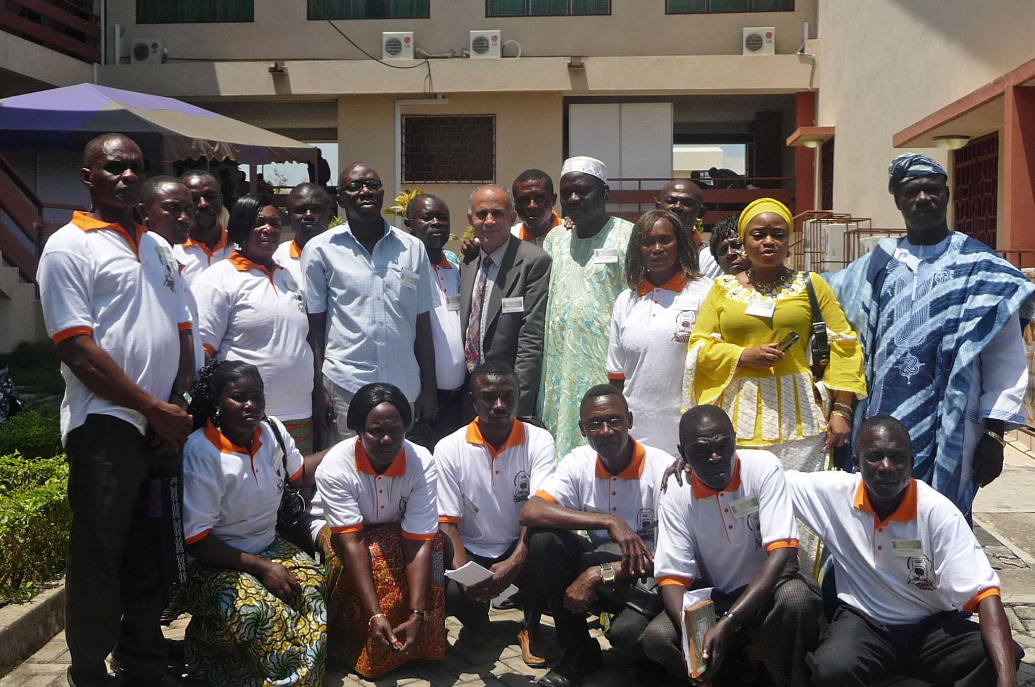 حضور مؤتمر الايدز العالمى الرابع بغانا 2010